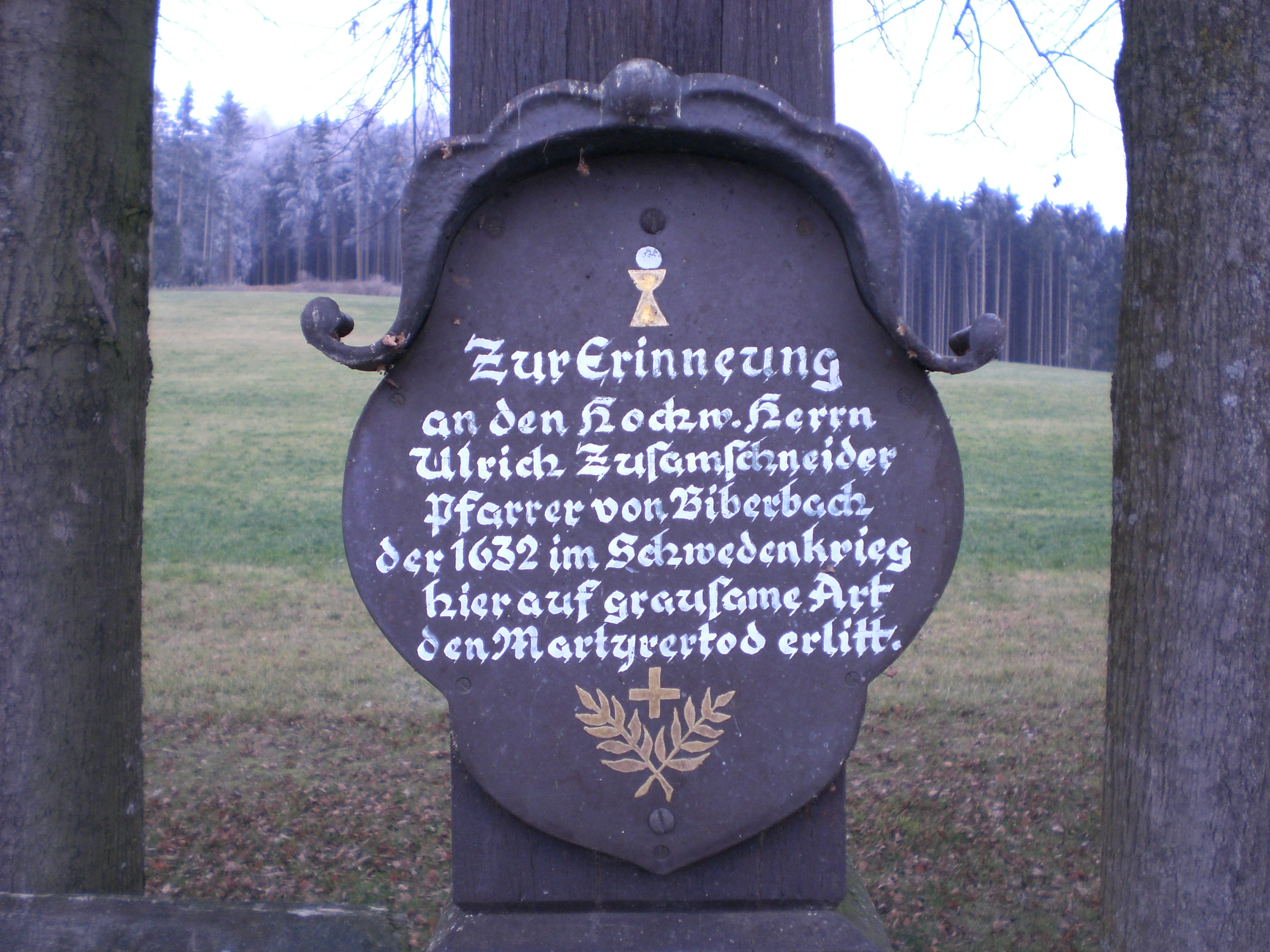 Mahnmal für Ulrich Zusemschneider bei Achsheim (Text, [1])